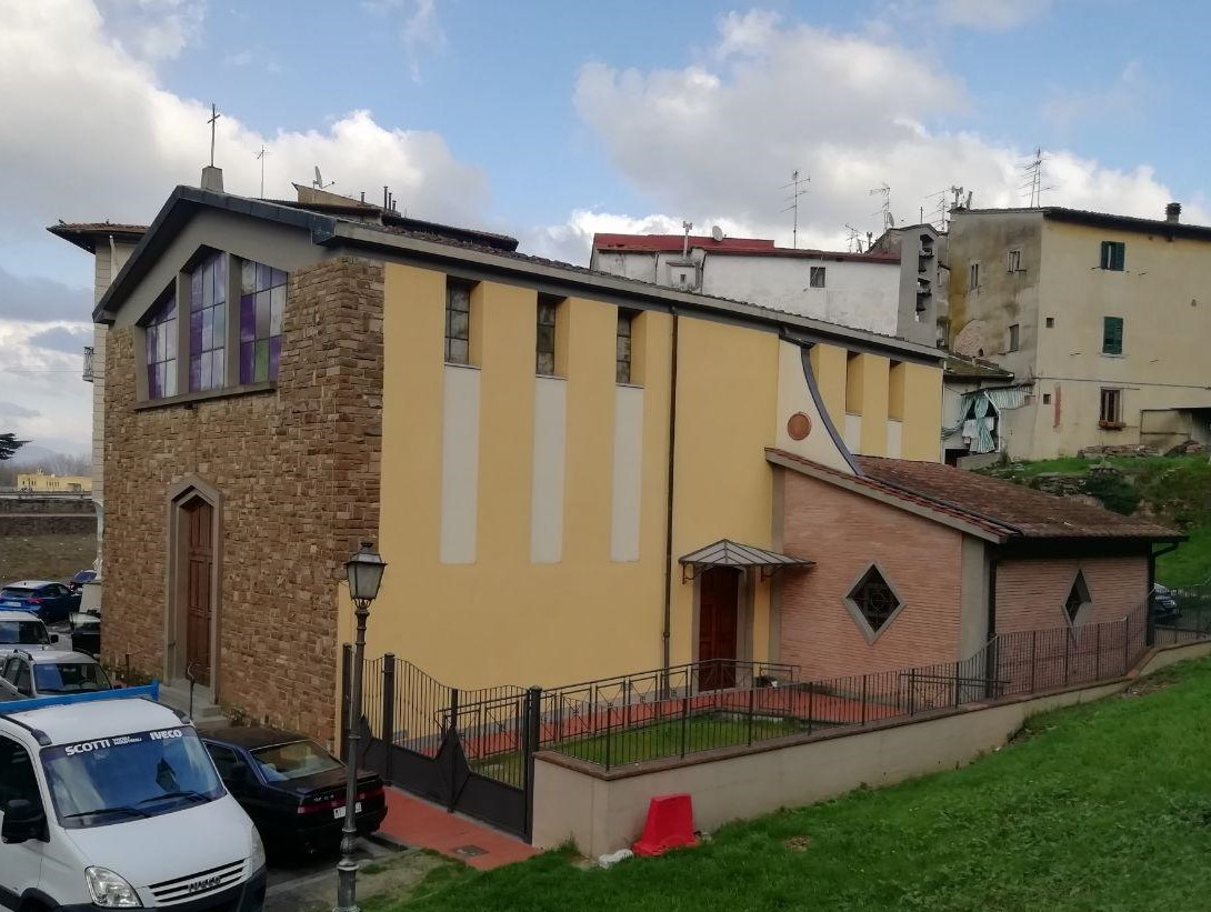 Chiesa di Sant'Anna a Ponte a Signa, lato sacrestia